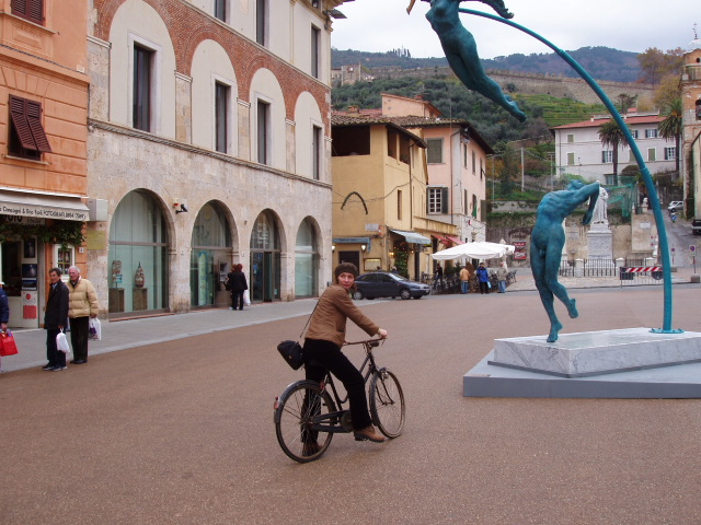 Estatua de Anna Chrmyi. en Pietrasanta, Italia